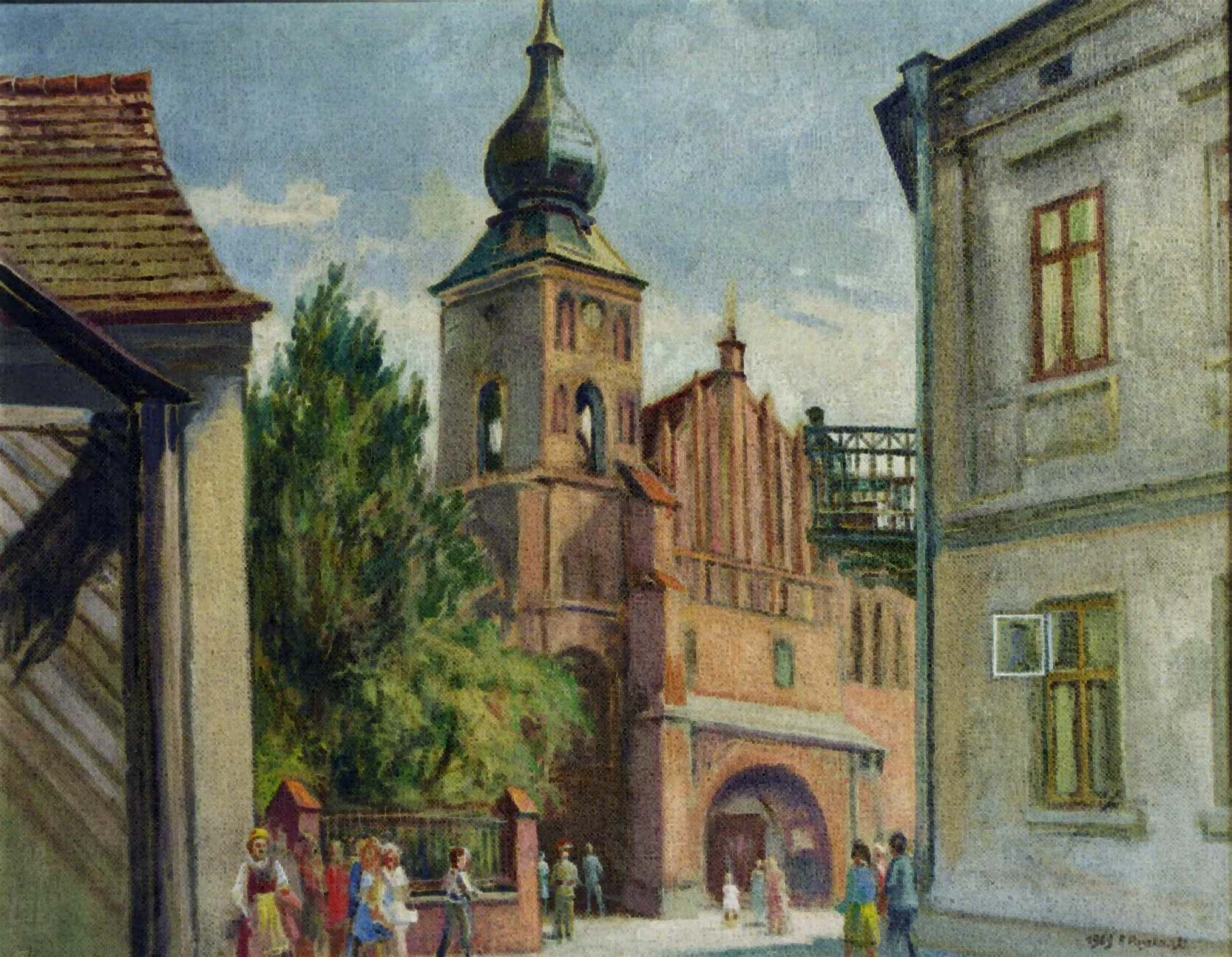 Kościół pw. Wszystkich Świętych (Sieradz)